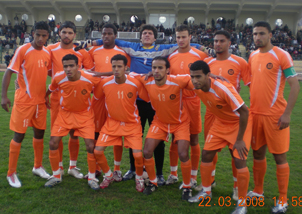 RSBerkane 2007-2008.